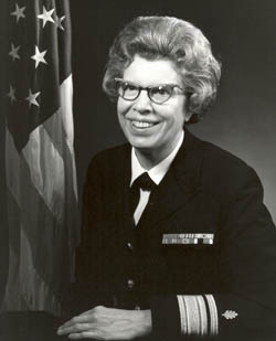 U.S. Navy Rear Admiral Alene Duerk, circa 1972.